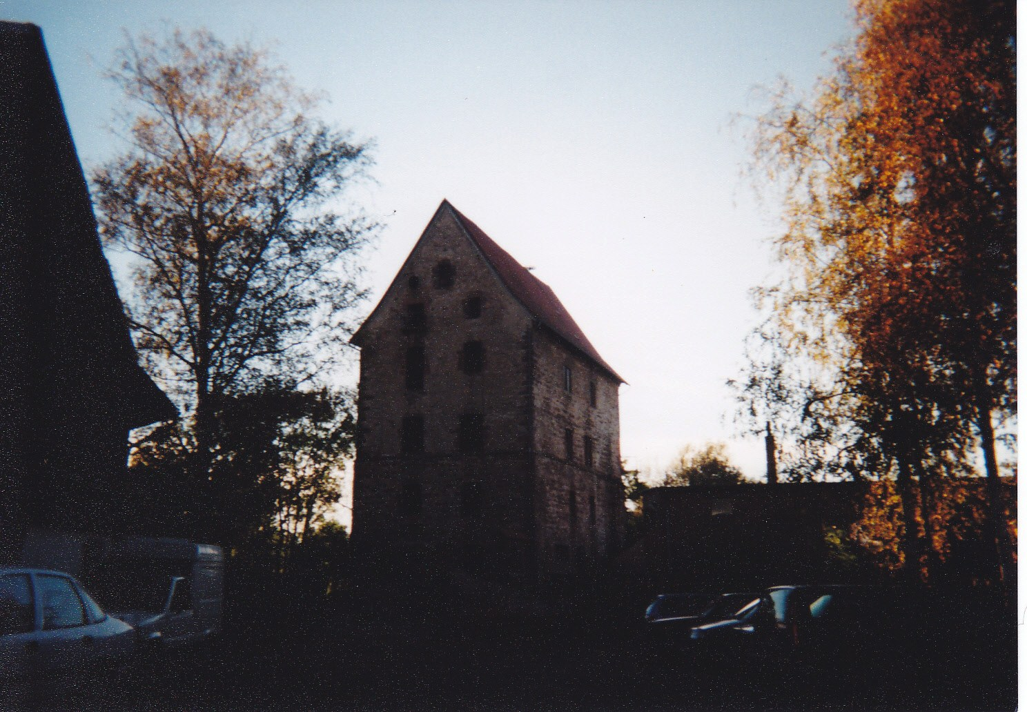 Das Lindauer Mushaus gegen Sonnenuntergang. Eine Aufnahme aus dem Jahre 2000.